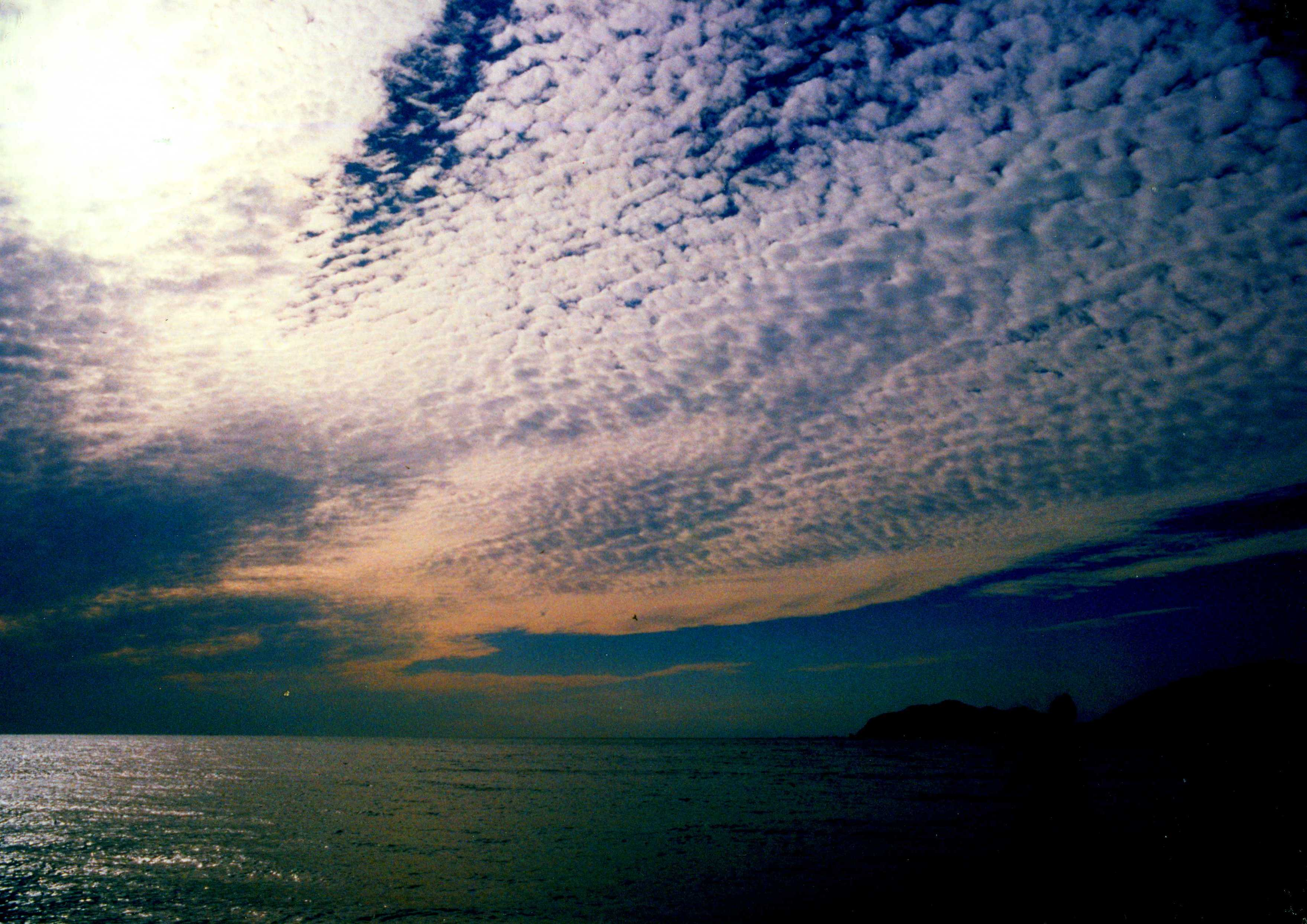 煙樹浜の海と空